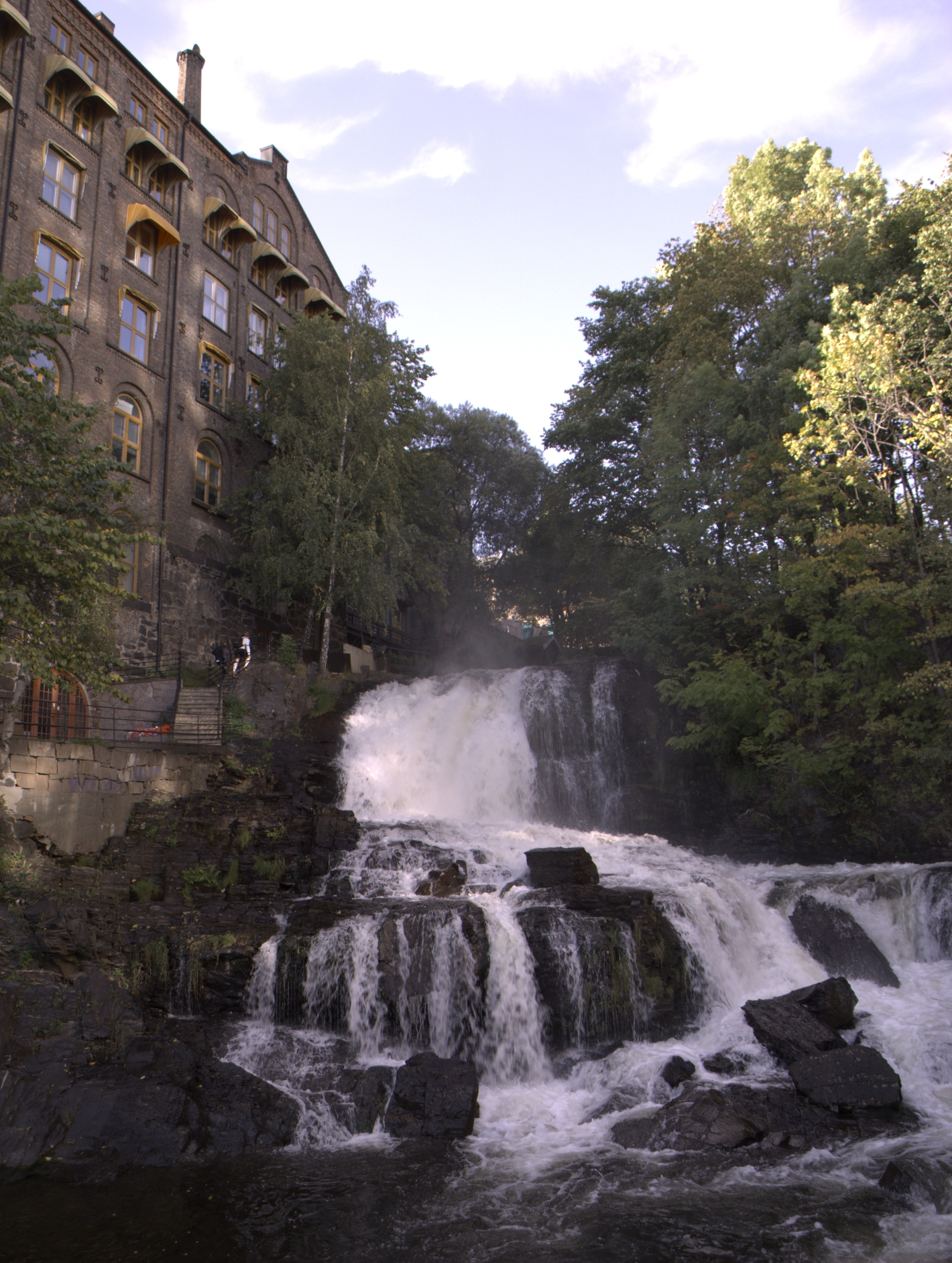 Våghalsen waterfall in river Akerselva at Sagene, Oslo